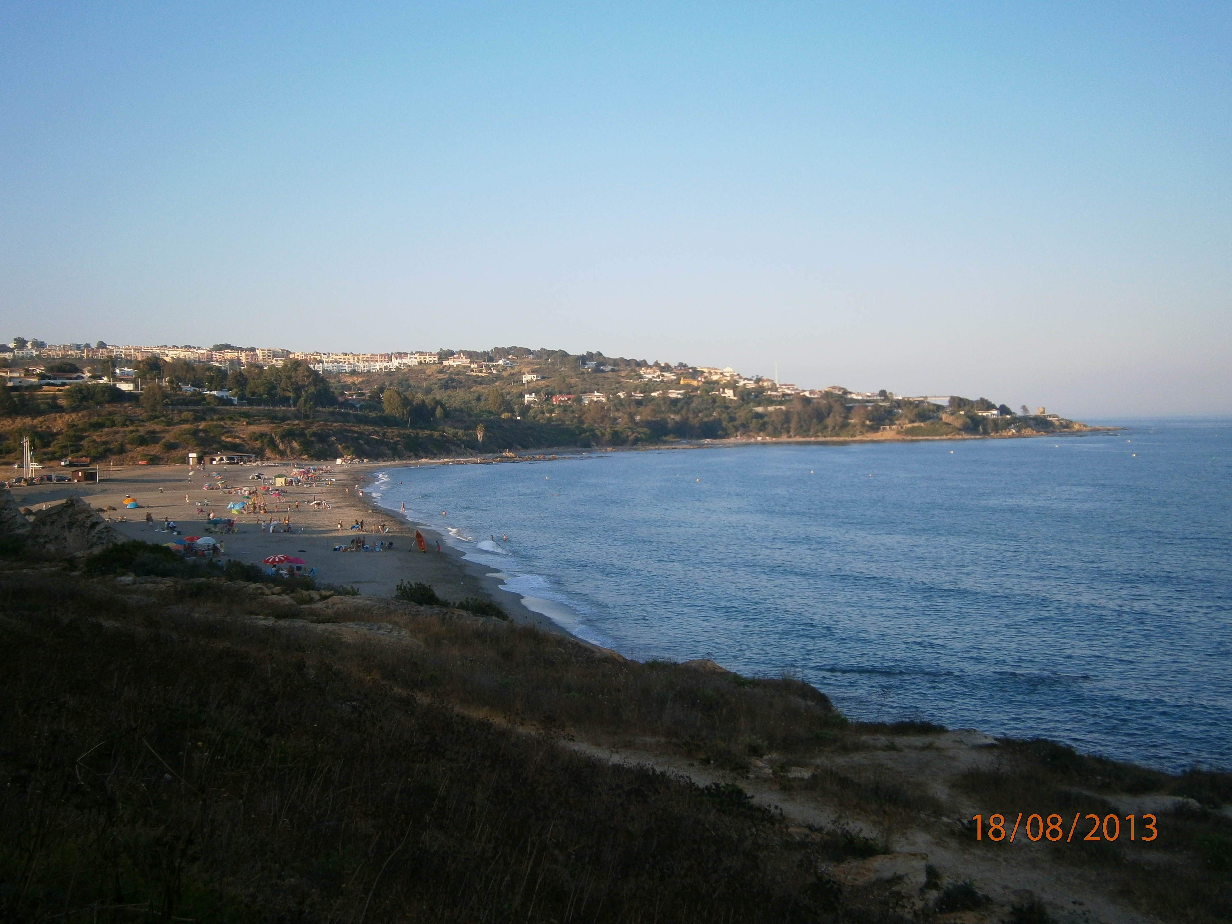 panoramica de la playa de cala sardina